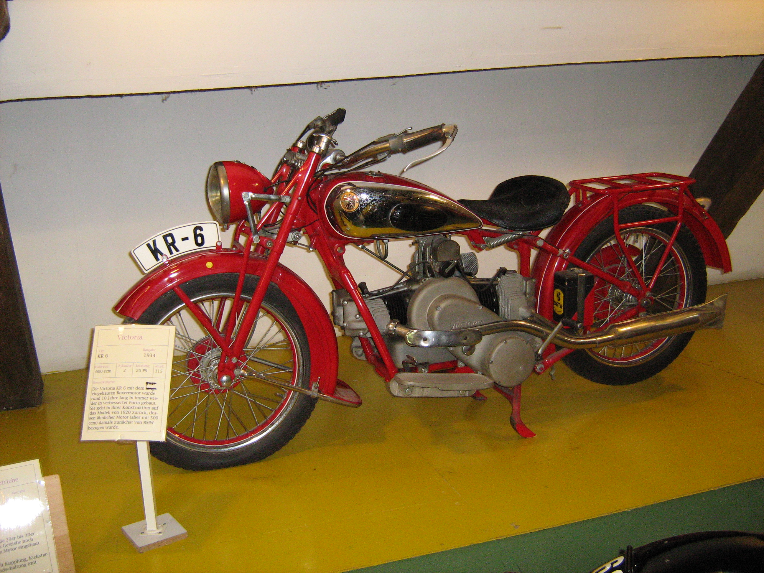 Victoria KR 6, Bj. 1934, 600 ccm, 20 PS, 115 km/h